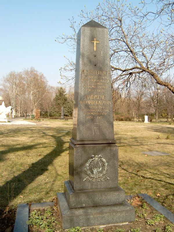 Náday Ferenc (eredetileg: Navratyil Ferenc)(1840. március 13. Pest - 1909. április 14. Bp.)színész, rendező és felesége Nádayné Vidmár Katalin (? , 1851. – Bp., 1935. júl. 28.) énekesnő (szoprán) sírja Budapesten. Kerepesi temető: 28-díszsor 43.